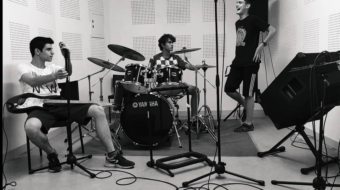 Spunishment (exactamente 3 de sus miembros) grabando para su nuevo disco en "El Túnel" Estudio musical de Zaragoza